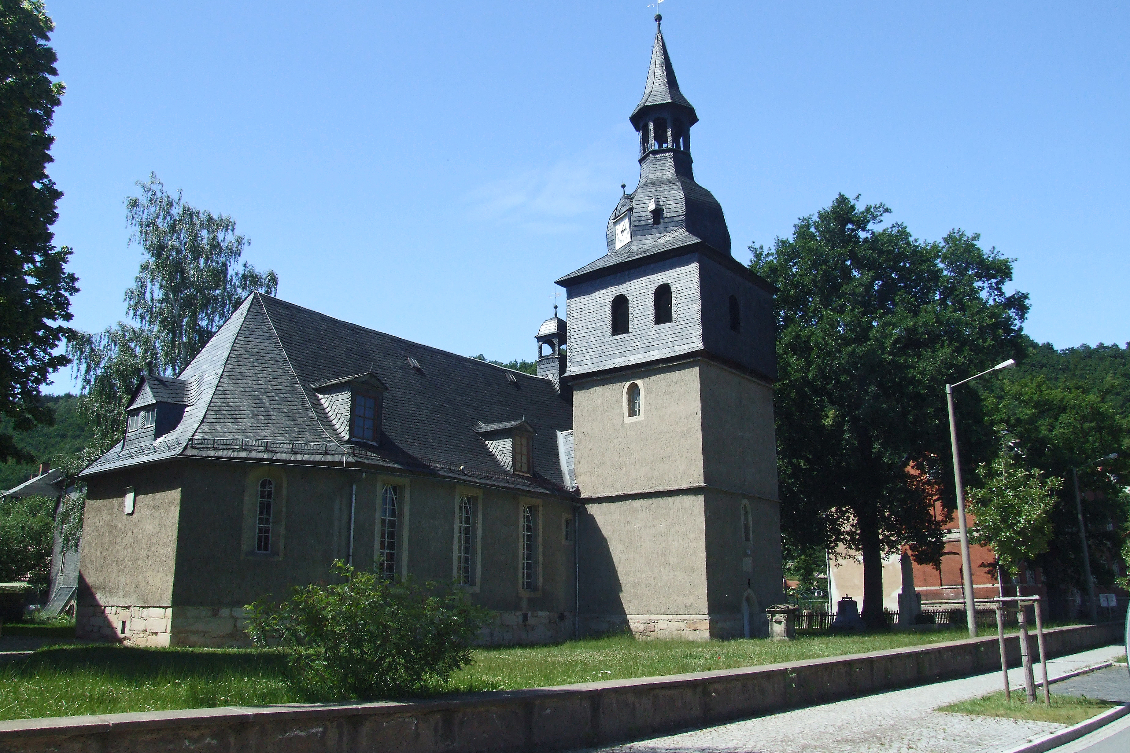 evang. Kirche Schwarza